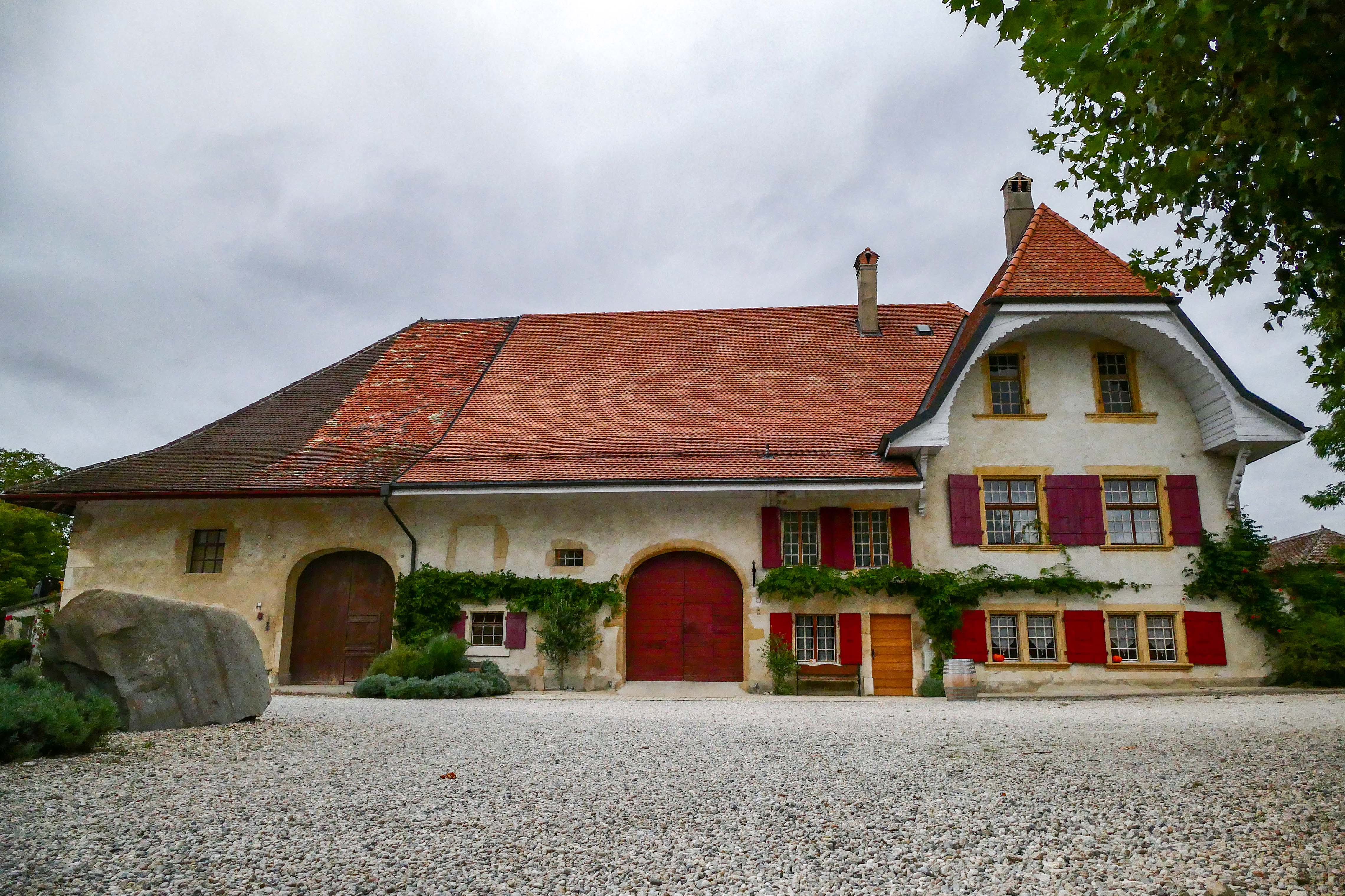 Le château de Arnex-sur-Orbe vu du sud.